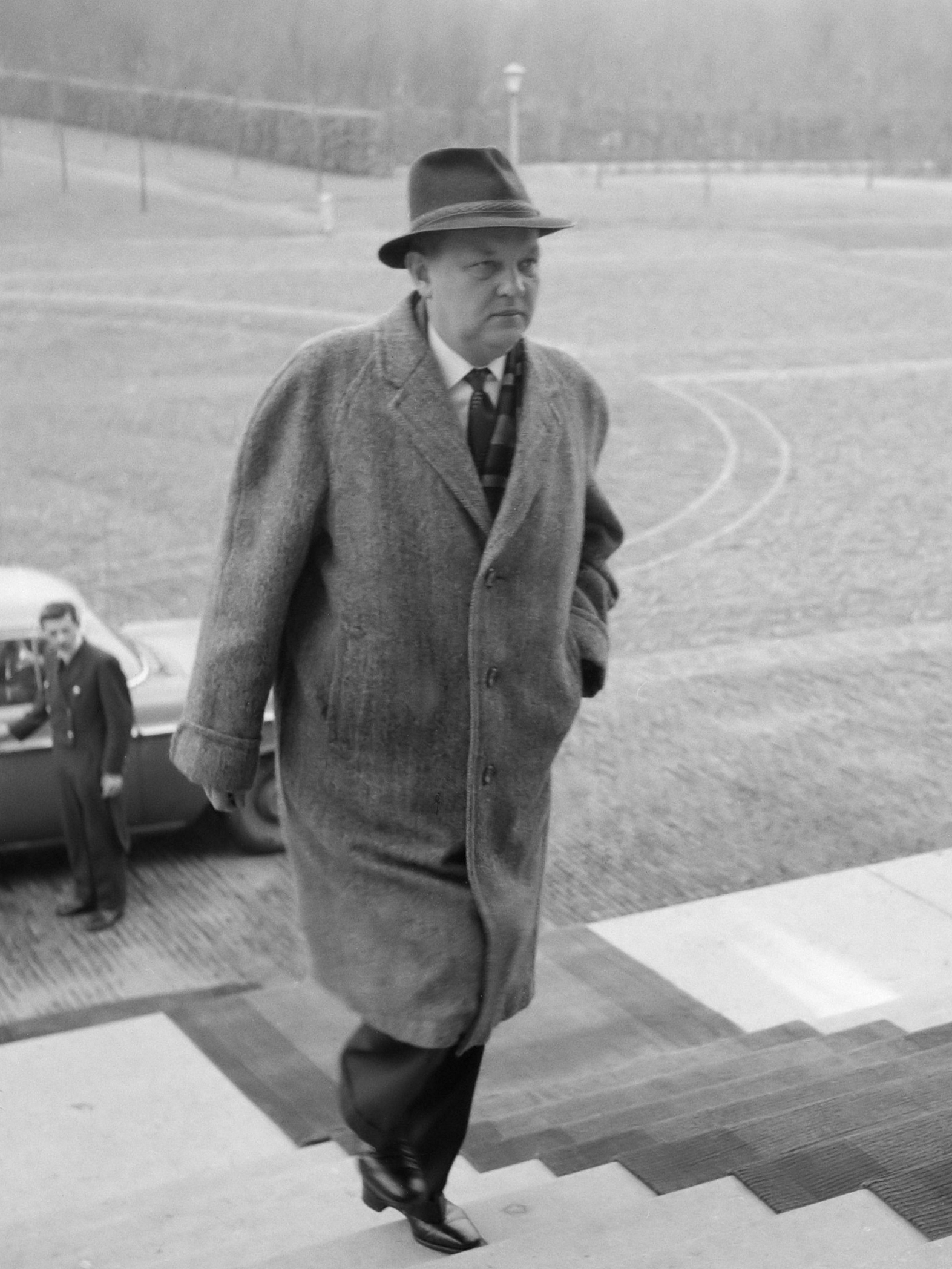 Koningin Juliana ontvangt fractieleiders. De fractievoorzitter van de AR, dhr. Bruinslot, op Huis ten Bosch 24 december 1960